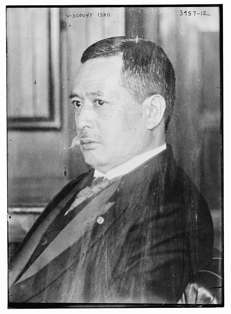 Viscount Kikujirō Ishii